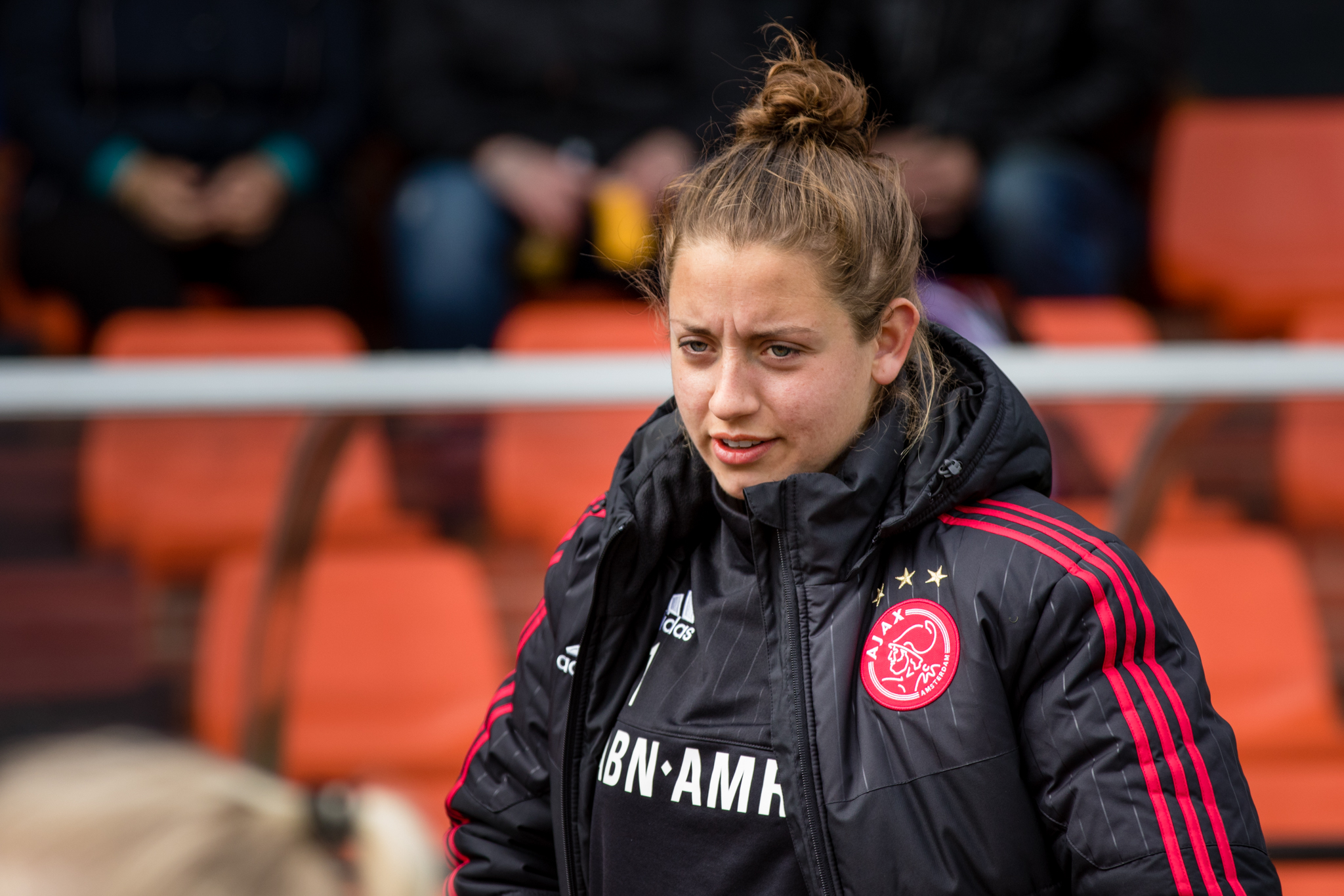 Laura Du Ry tijdens een clinic van Ajax Vrouwen voor de jeugd van Longa '30 in Lichtenvoorde